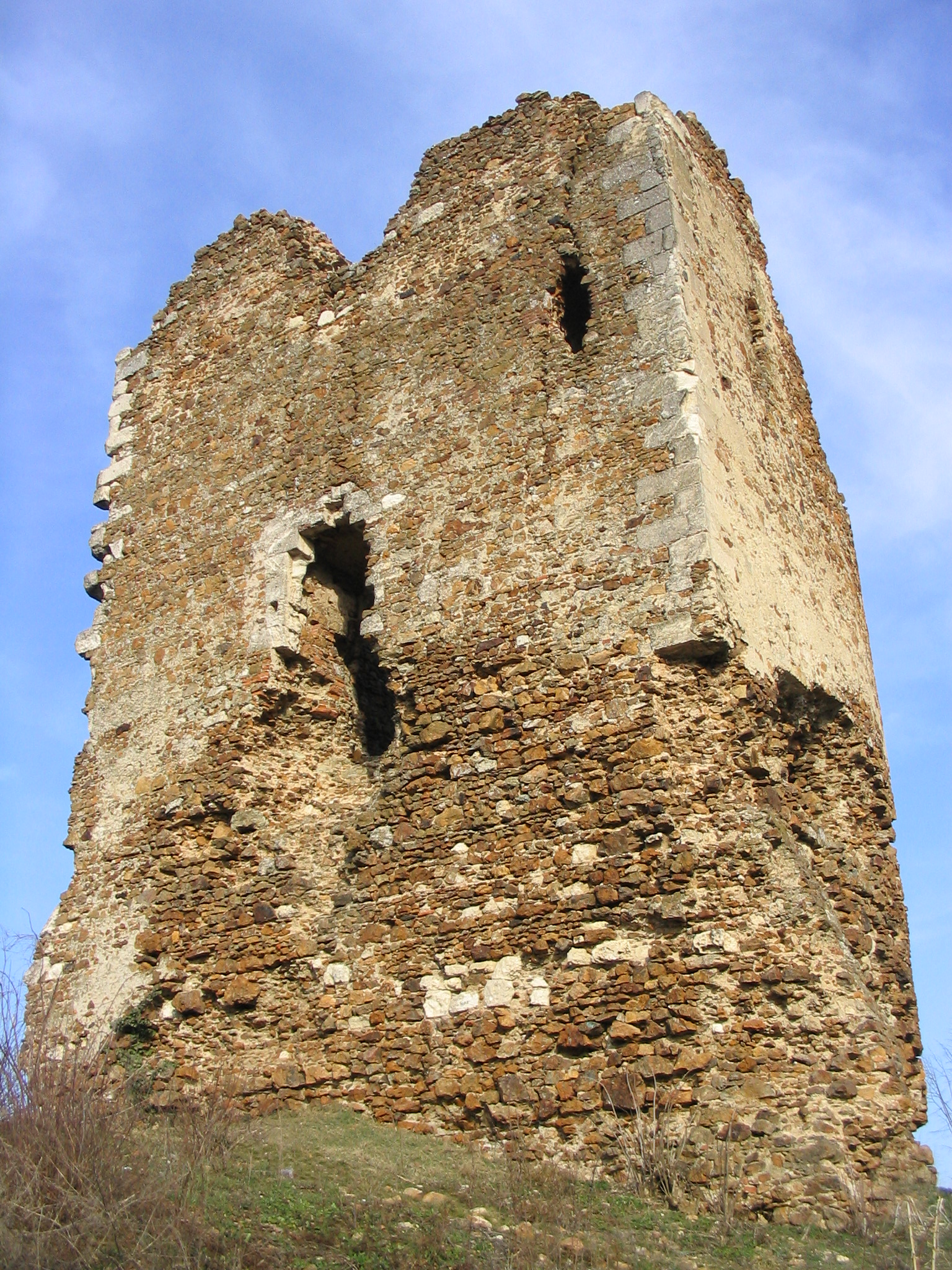 Врдничка кула висине 18.5 метара налази се северно од Врдника на пола сата хода на висини 383 метра. Подигнута је највероватније у 12. веку, мада новија истраживања откривају темеље из римског периода. Припада грађевинама средњовековне војничке архитектуре.